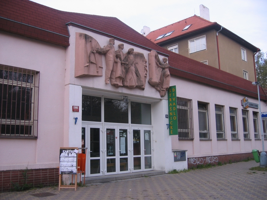 Fotografie Strašnického divadla